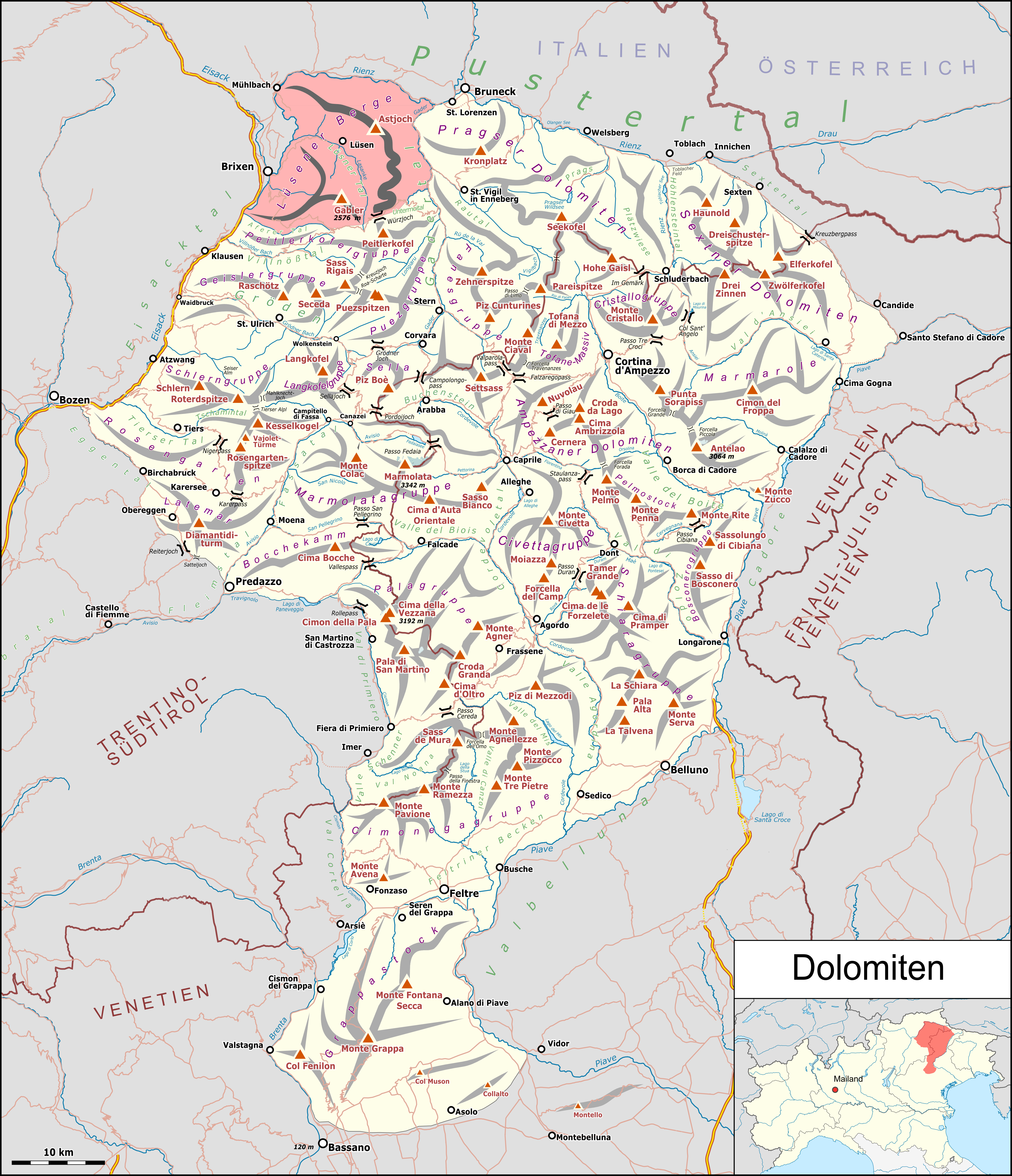 Karte der Dolomiten mit Lüsner Berge